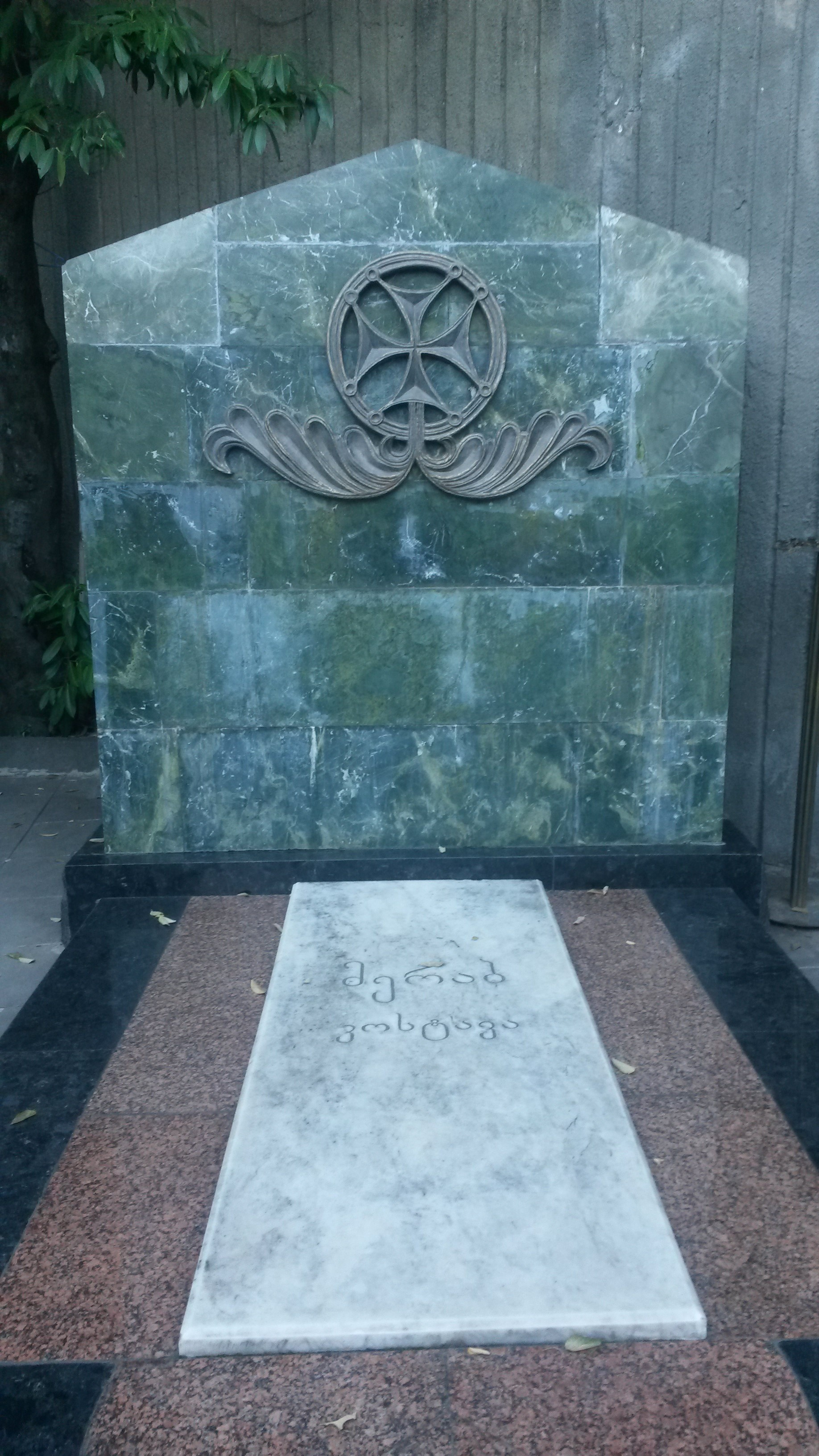 მთაწმინდის პანთეონი